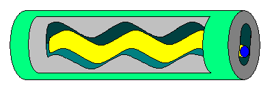 Exzenterschneckenpumpe Schemabild